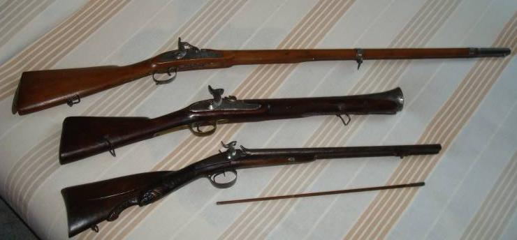 Photo de fusils à poudre noire